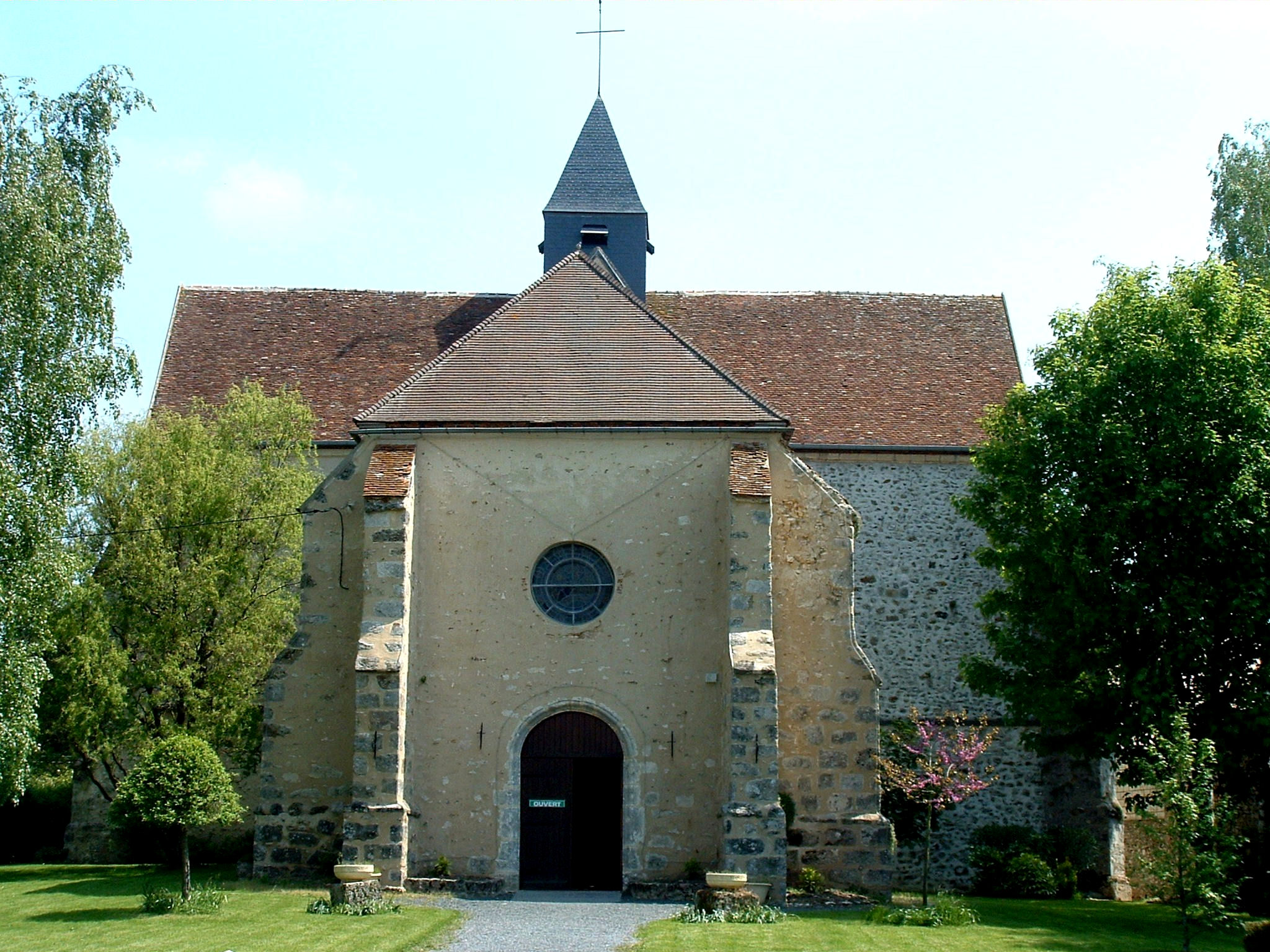 Fromentières (Marne) - Eglise Sainte-Marie-Madeleine